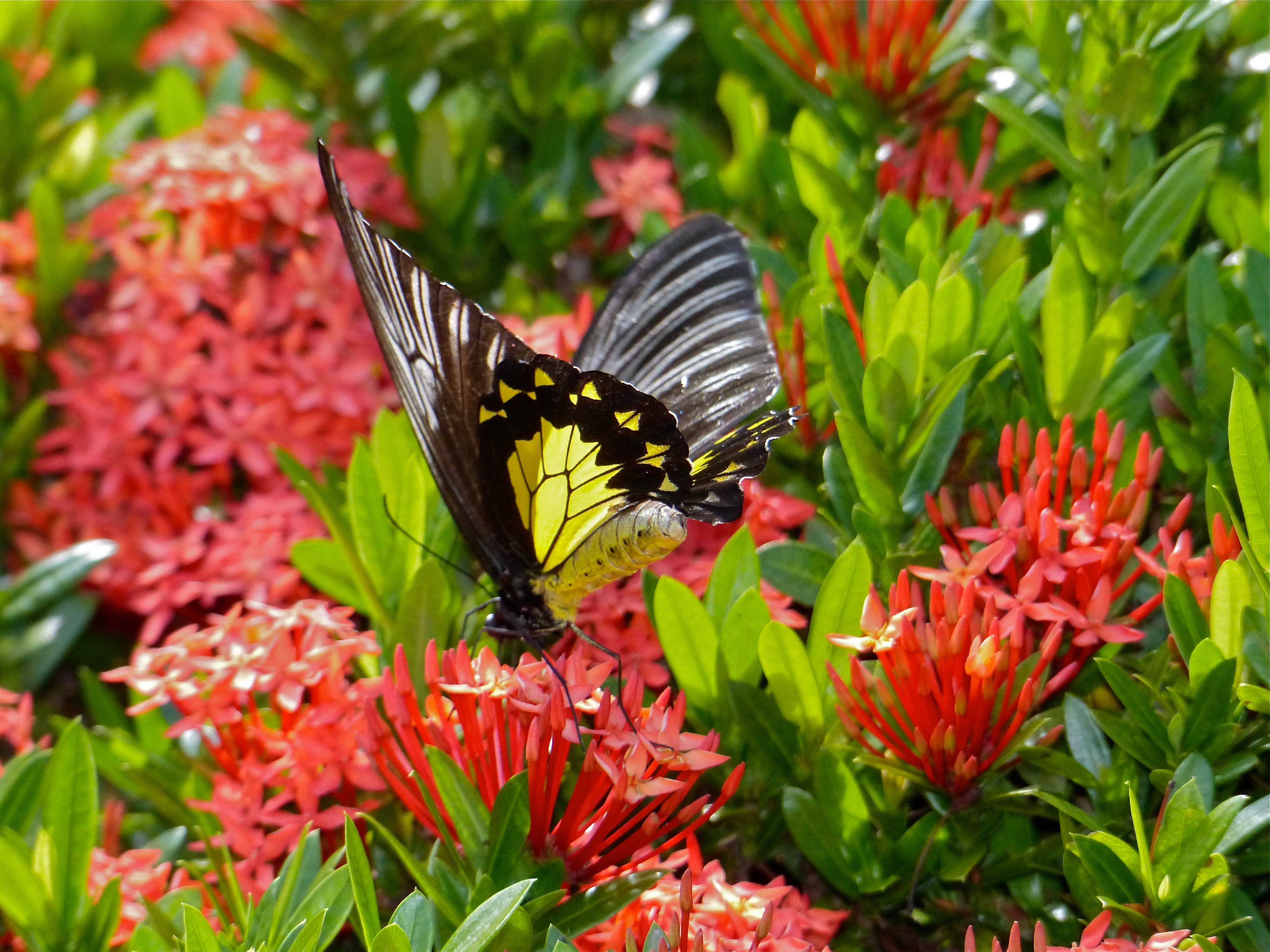 Niah NP Headquarters, Sarawak, MALAYSIA